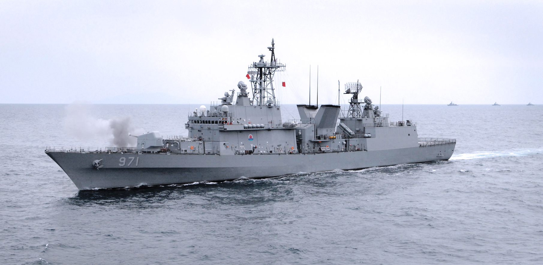 초대형 태풍 하이옌으로 도움이 절실한 필리핀을 지원하기위해 지난 16일부터 우리 정부에서 제공하는 구호물자와 구호인력을 싣고 공군 C-130 수송기 2대를 파견했다. 이를 위해 공군15특수임무비행단을 중심으로 46명으로 구성된 구호팀은 구호물자를 하역한 후 현지에 마지막으로 남아있던 우리 교민과 현지 이재민 등 100여 명을 C-130 수송기에 태우고 세부 막탄 공항으로 옮겼다. 우리 공군이 해외 임무 수행 중 해외 이재민들을 직접 수송한 것은 이번이 처음이다. 공군 구호팀은 하루 2∼4차례 세부와 타클로반을 오가며 임무를 수행하고 있다.